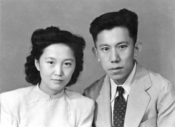 1940年代的高集与高汾